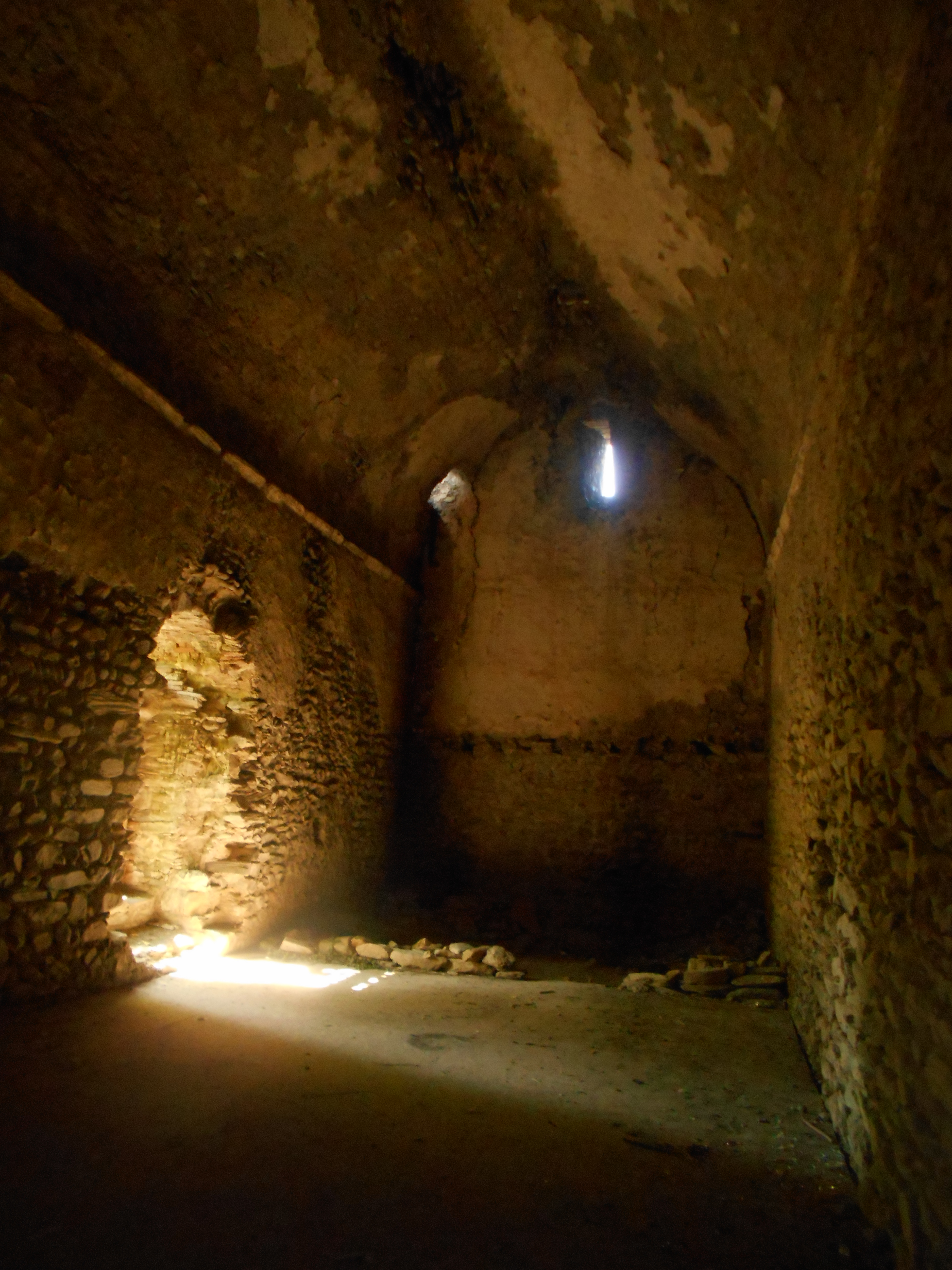 Antiga església parroquial de Santa Eulàlia de Vilella. Interior. Peus de la nau